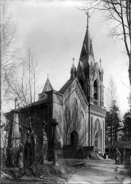 Rasų kapinės